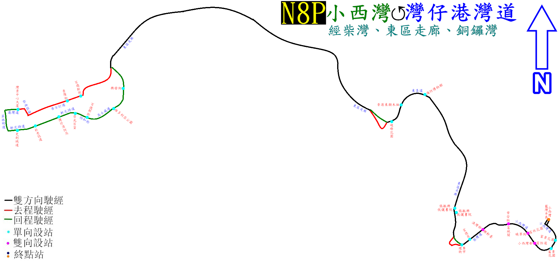 中文（香港）: 新巴N8P線的走線圖